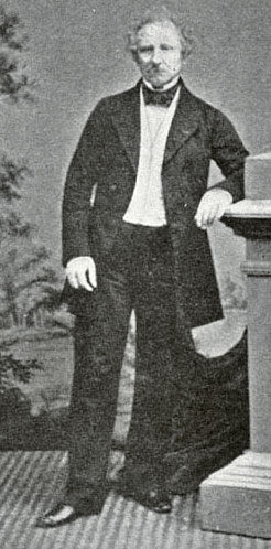 Portret van Frederic Henri Louis van Swieten (ca 1813-1905) oud-majoor der cavalerie en stichter van de Gerard Adriaan van Swietentuinbouwschool in Frederiksoord